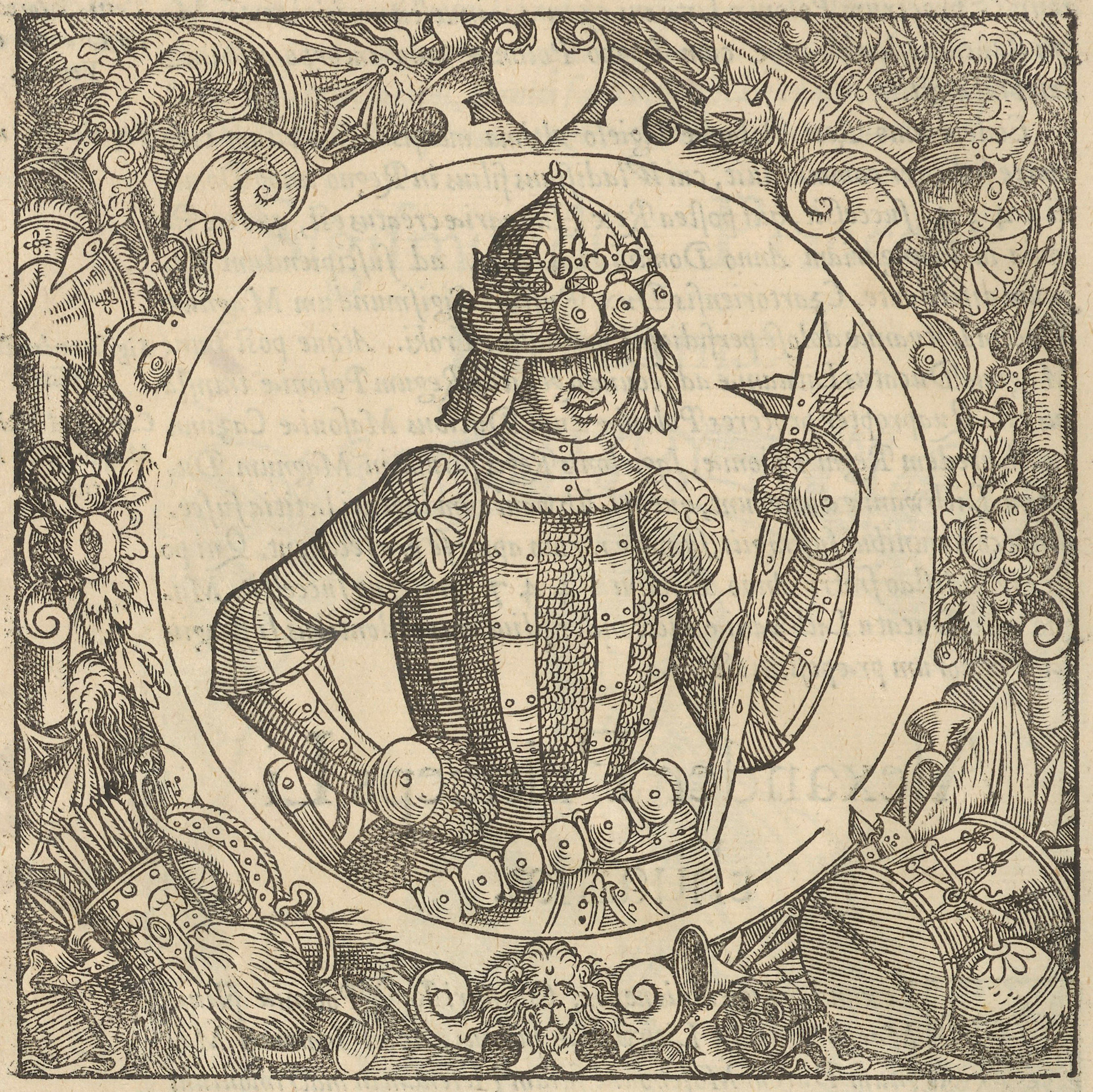 Беларуская (тарашкевіца): Аляксандар, вялікі князь літоўскі